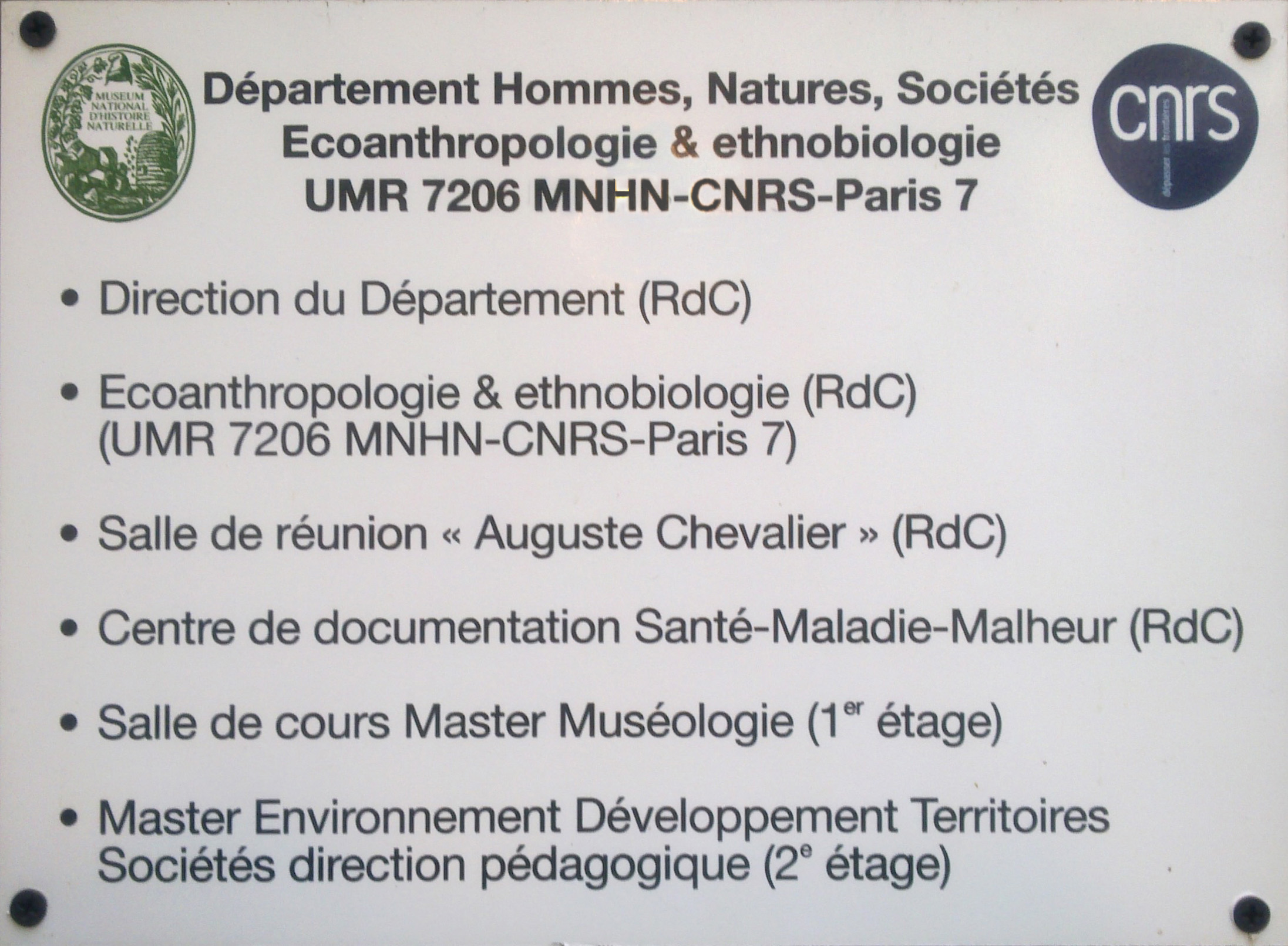 Département de Géonomie (Hommes, Nature, Sociétés), MNHN Paris, photo S.I.Cepleanu